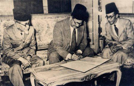 من اليمين عبدالرحمن باسويدان (وزير الإعلام الإندونيسي) , ومحمود فهمي النقراشي باشا (رئيس الوزراء ووزير الخارجية المصري) , وأجوس سالم (وزير الخارجية الإندونيسي) يوقعون معاهدة صداقة بين مصر وإندونيسيا في 10 يونيو 1947 م ..